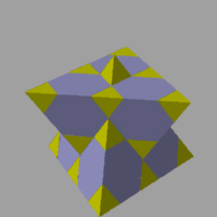 Nid d'abeille cubique alterné bitronqué